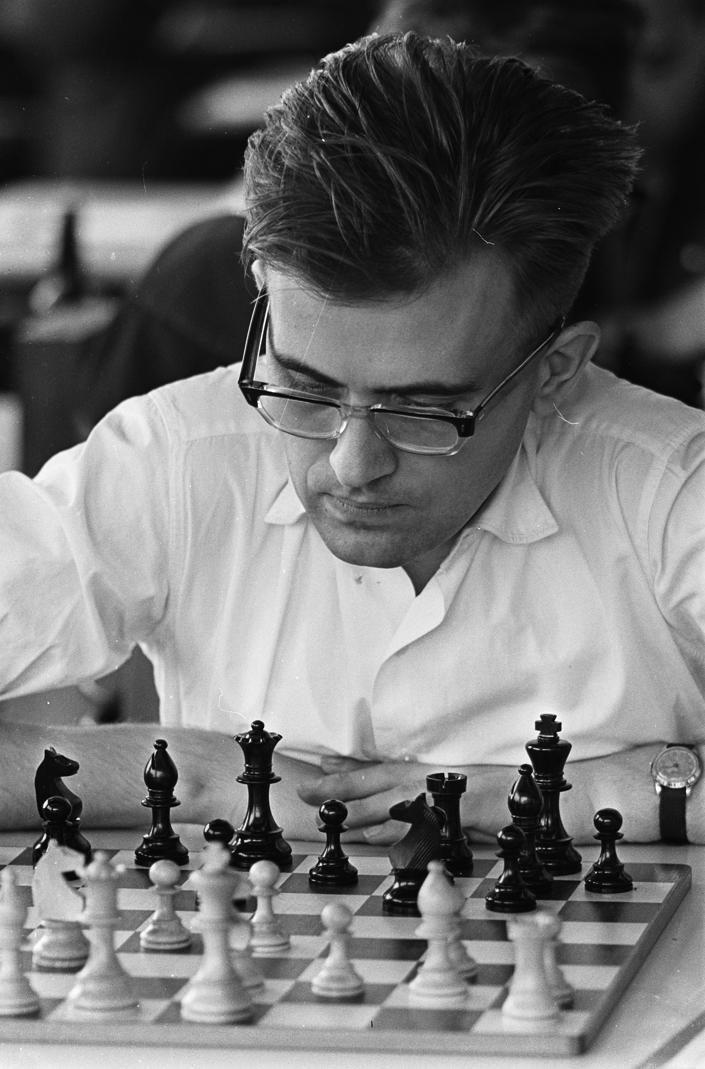 Collectie / Archief : Fotocollectie Anefo Reportage / Serie : [ onbekend ] Beschrijving : Interzonaal fide schaaktoernooi in GAK gebouw, nr. 2, 3 Larsen Datum : 26 mei 1964 Trefwoorden : SCHAAKTOURNOOIEN Instellingsnaam : GAK Fotograaf : Pot, Harry / Anefo Auteursrechthebbende : Nationaal Archief Materiaalsoort : Negatief (zwart/wit) Nummer archiefinventaris : bekijk toegang 2.24.01.05 Bestanddeelnummer : 916-4757